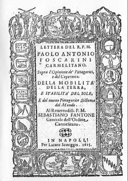 Paolo Antonio Foscarini (1565-1616), Lettera sopra l’opinione de’ Pitagorici e del Copernico.